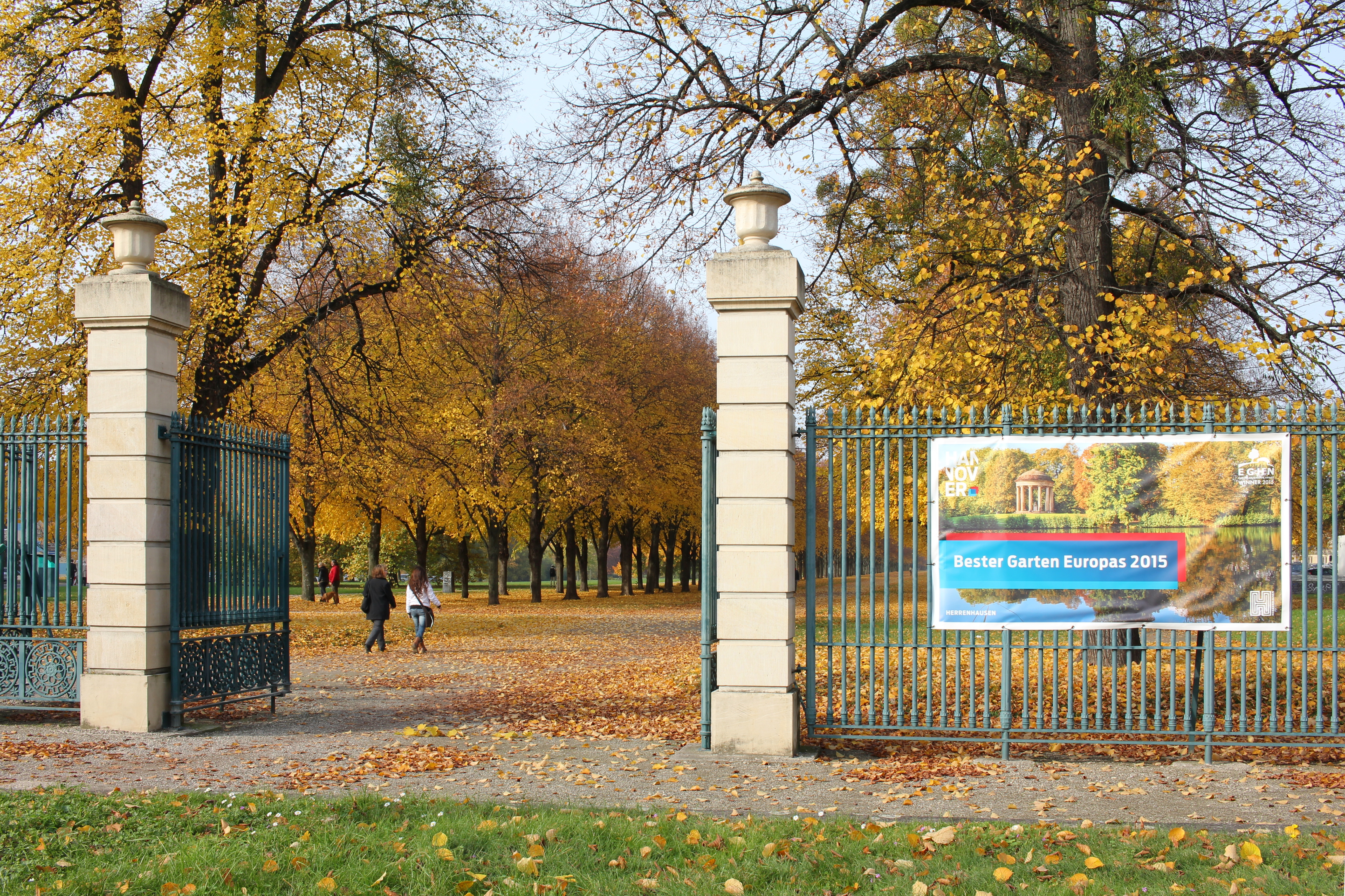 Eingangstor der Herrenhäuser Allee in Hannover. Das Plakat "Bester Garten Europas 2015" weist auf den vom European Garden Heritage Network verliehenen Preis hin.